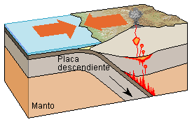 Autor: Usuario:Lmb